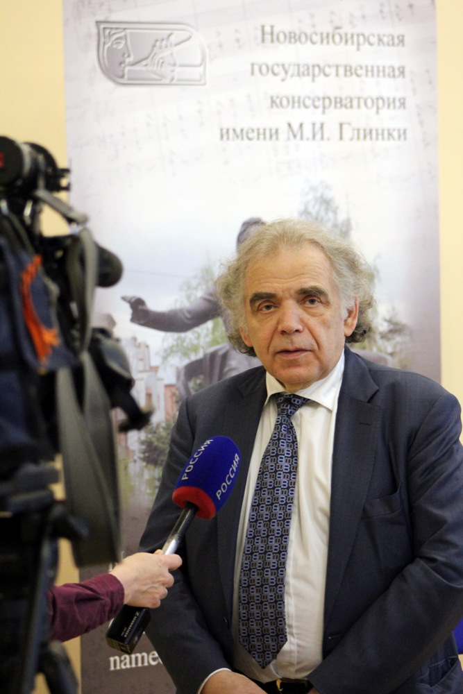 Захар Нухимович БРОН в Новосибирской консерватории